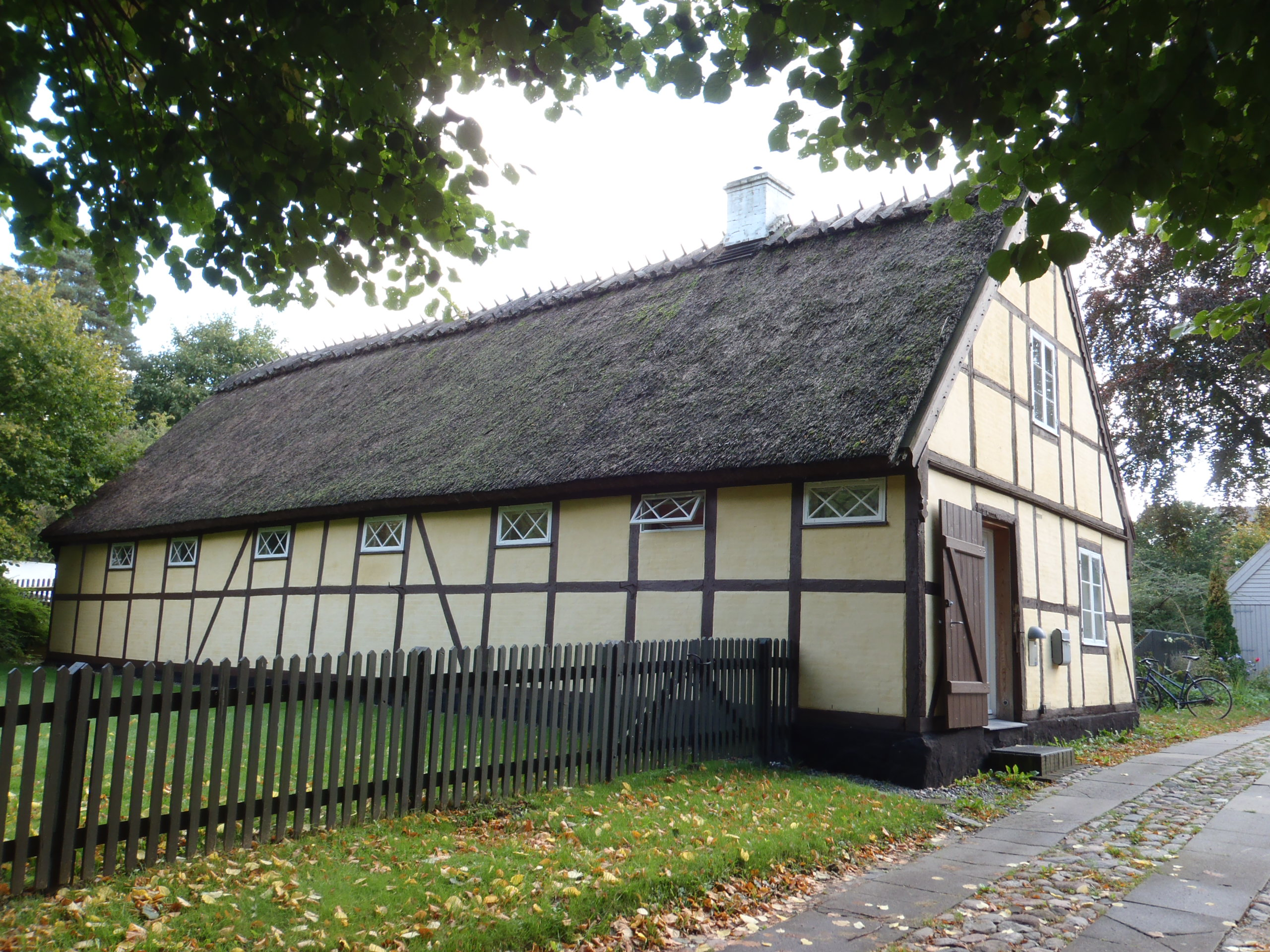 Den tidligere vogn- og staldbygning for præstegården i Kongens Lyngby.